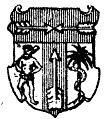 Vapensköld för adliga ätten von Walden nr 1708, Sveriges Riddarhus.